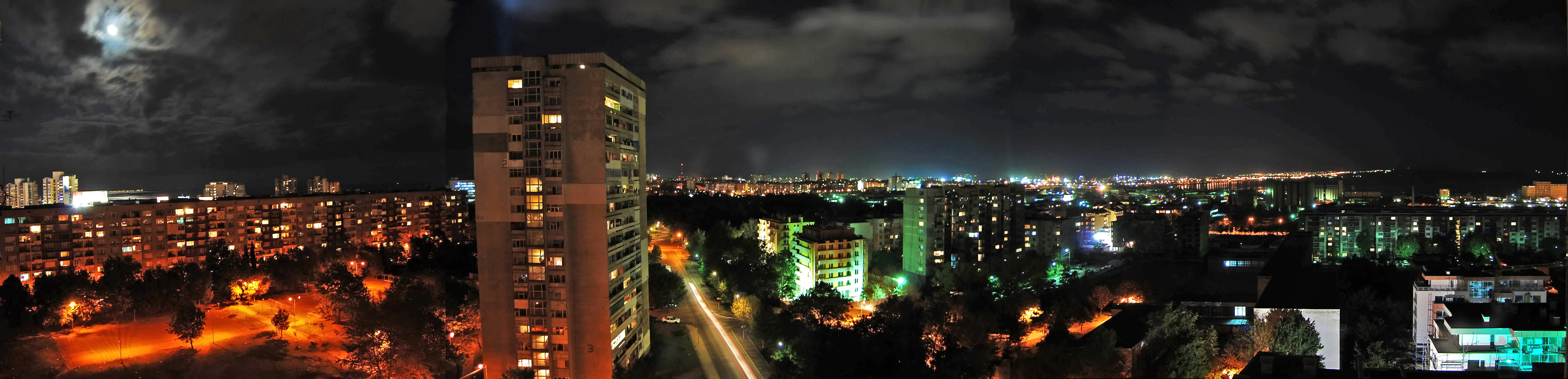 Нощна панорама на Бургас от 13 етаж на 4 блок в ж.к. "П. Р. Славейков". От ляво - ж.к. "Изгрев", Черно Море, Атанасовско езеро и Поморие; в средата - ж.к. "Лазур", телевизионна кула "Бургас", ж.к. "Братя Миладинови", ж.к. "Възраждане"; от дясно - северна и южна промишлена зона, кв. "Акациите" и кв. "Победа", пристанище Бургас - запад, ж.к. "Меден Рудник", бургаско езеро "Вая".